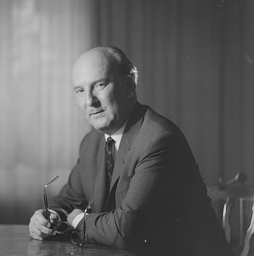 Porträtfoto von Prof. Werner Hartmann von 1964